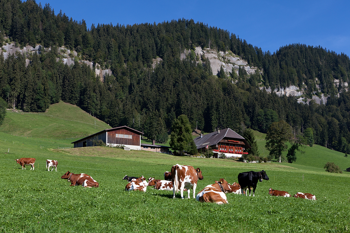 Weiler Wald in Schangnau